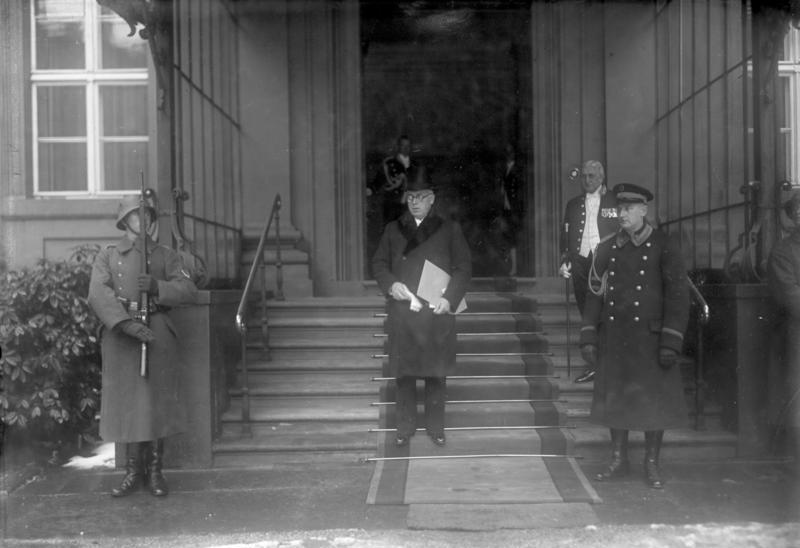 Amtsantritt des neune littauischen Gesandten in Berlin, Dr. Jurgis Saulys! Der neue littauische Gesandte Dr. Jurgis Saulys beim Verlassen des Reichspräsident-Palais nach der Überreichung seines Beglaubigungsschreibens in Berlin